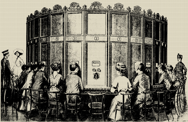 Drzeworyt z prospektu Augusta Fuhrmanna - rok ok. 1880, autor nieznany.